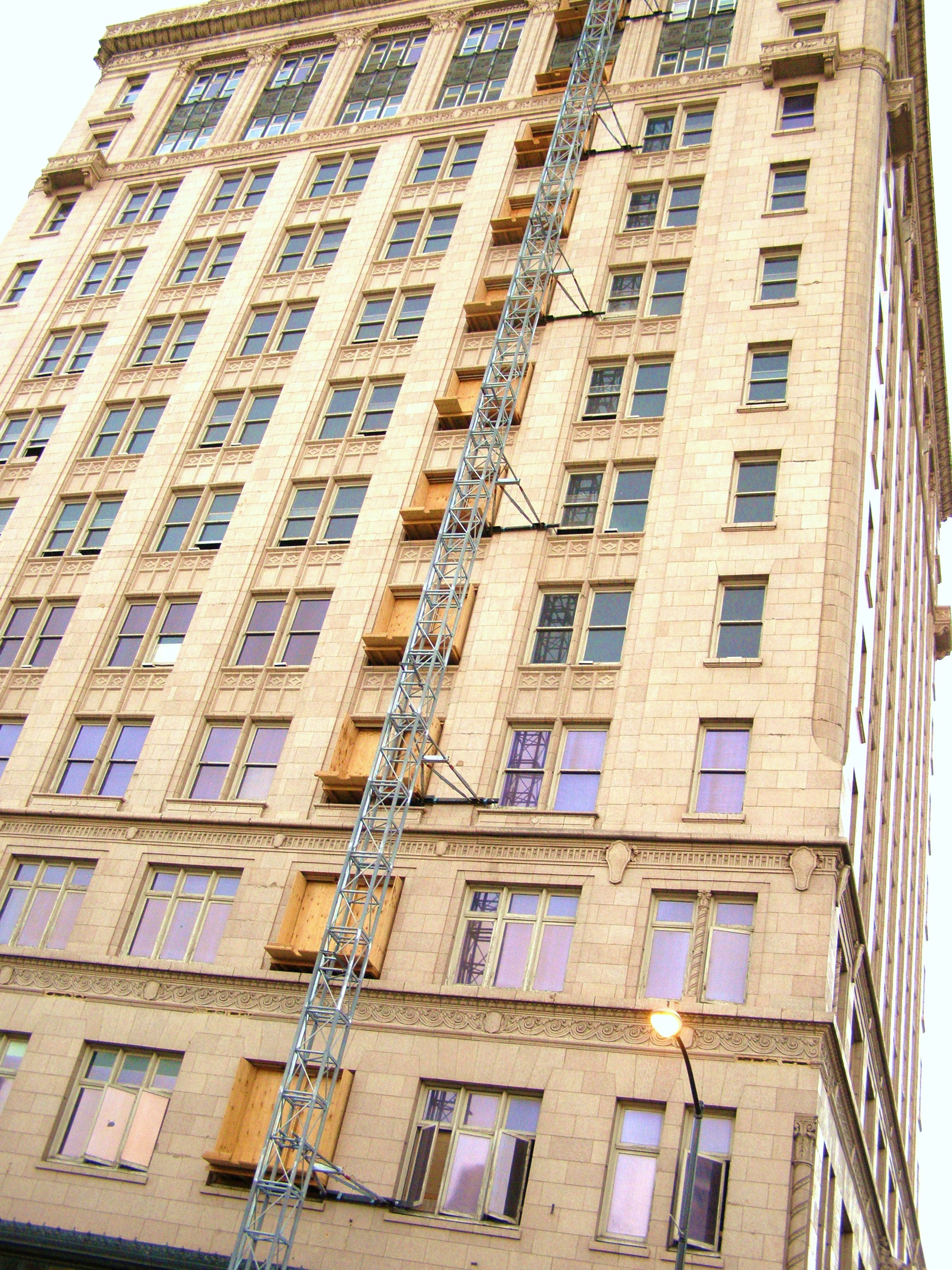 PA021008